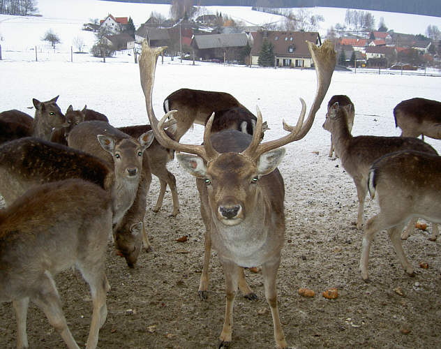 Dammwildgehege in Motzersreuth